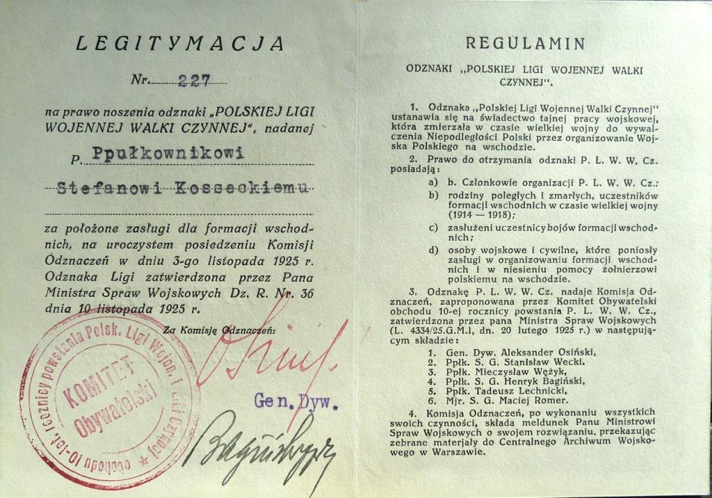 Legitymacja odznaki Polskiej Ligi Wojennej Walki Czynnej nadana ppłk Stefanowi Kosseckiemu 10 listopada 1925 r.